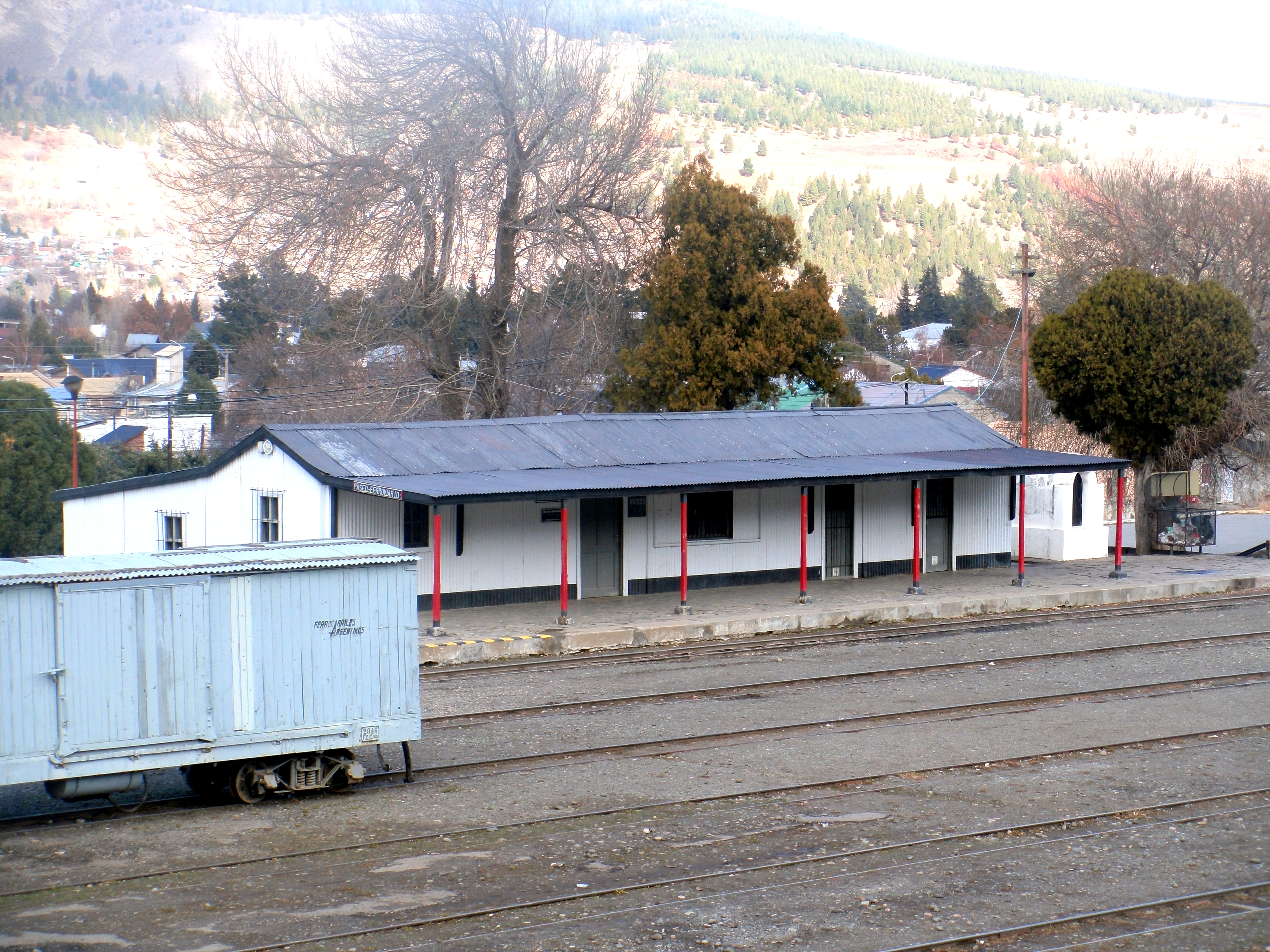 Antigua estación reemplazada por la nueva más amplia y moderna